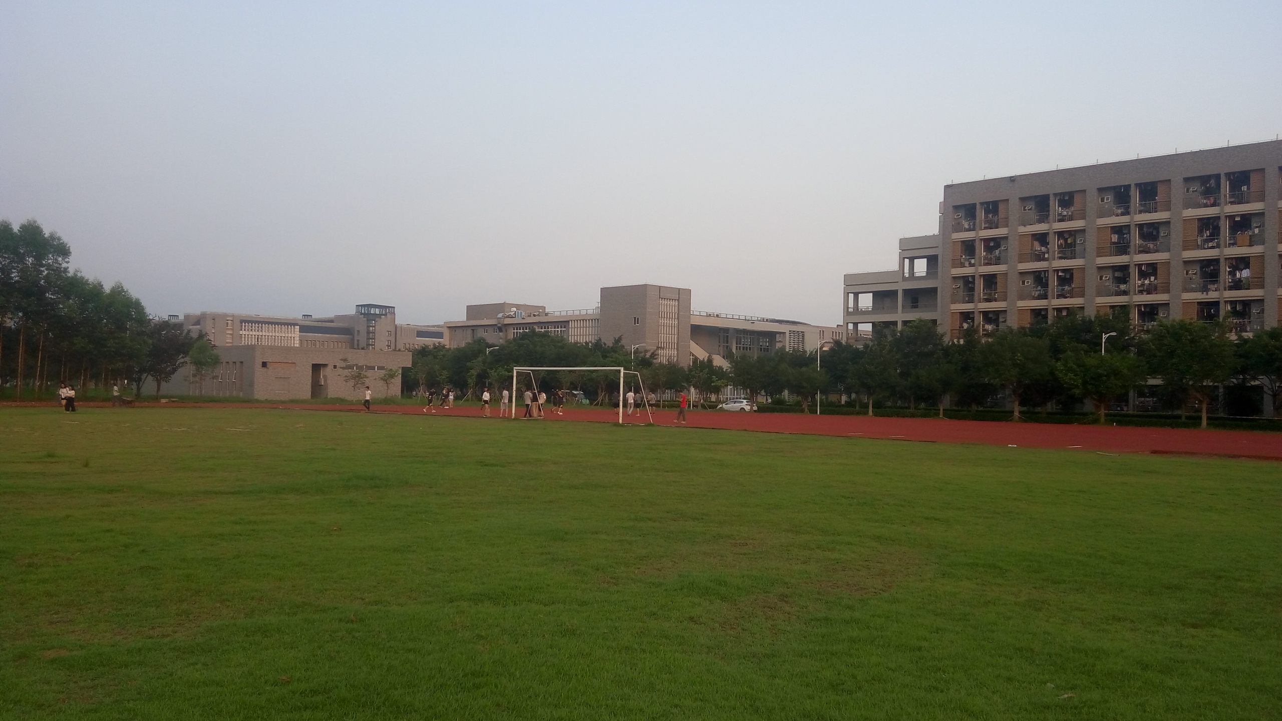 中文（中国大陆）: 广东南华工商职业学院操场